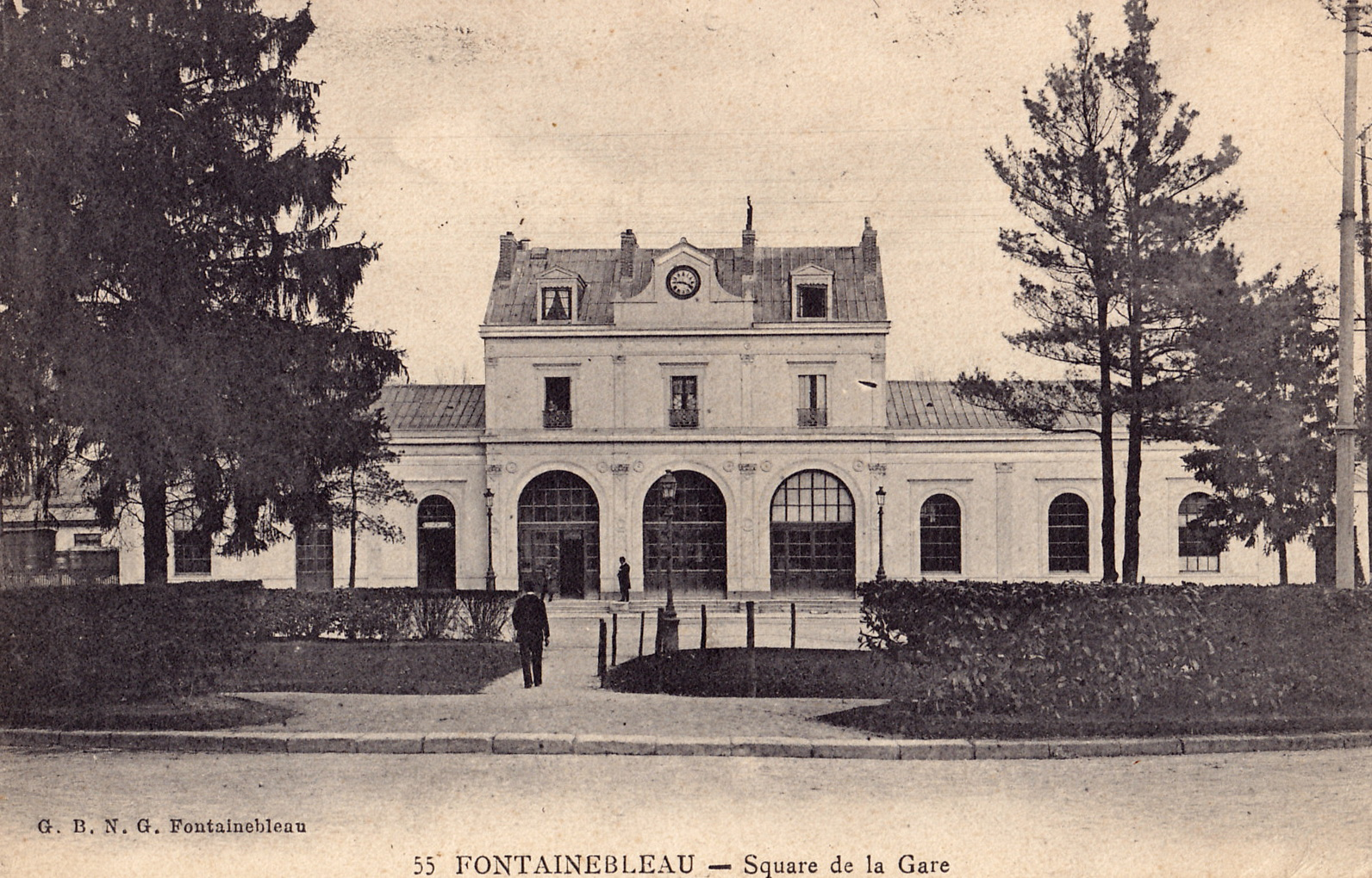 Carte postale ancienne éditée par G. B. N. G. à Fontainebleau : FONTAINEBLEAU - Square de la Gare